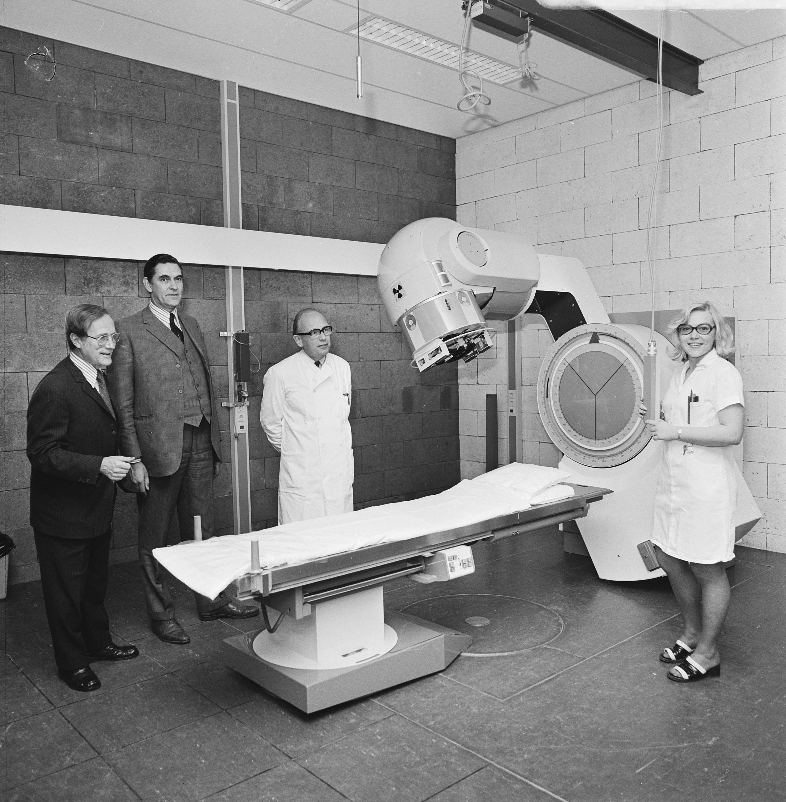 Officiële opening van het Antoni van Leeuwenhoek Ziekenhuis in Amsterdam. V.l.n.r. professor Breur, dr. C.R. Post (geneesheer-directeur) en dr. Sindram bij een kobaltstraler. Datum 29 oktober 1973